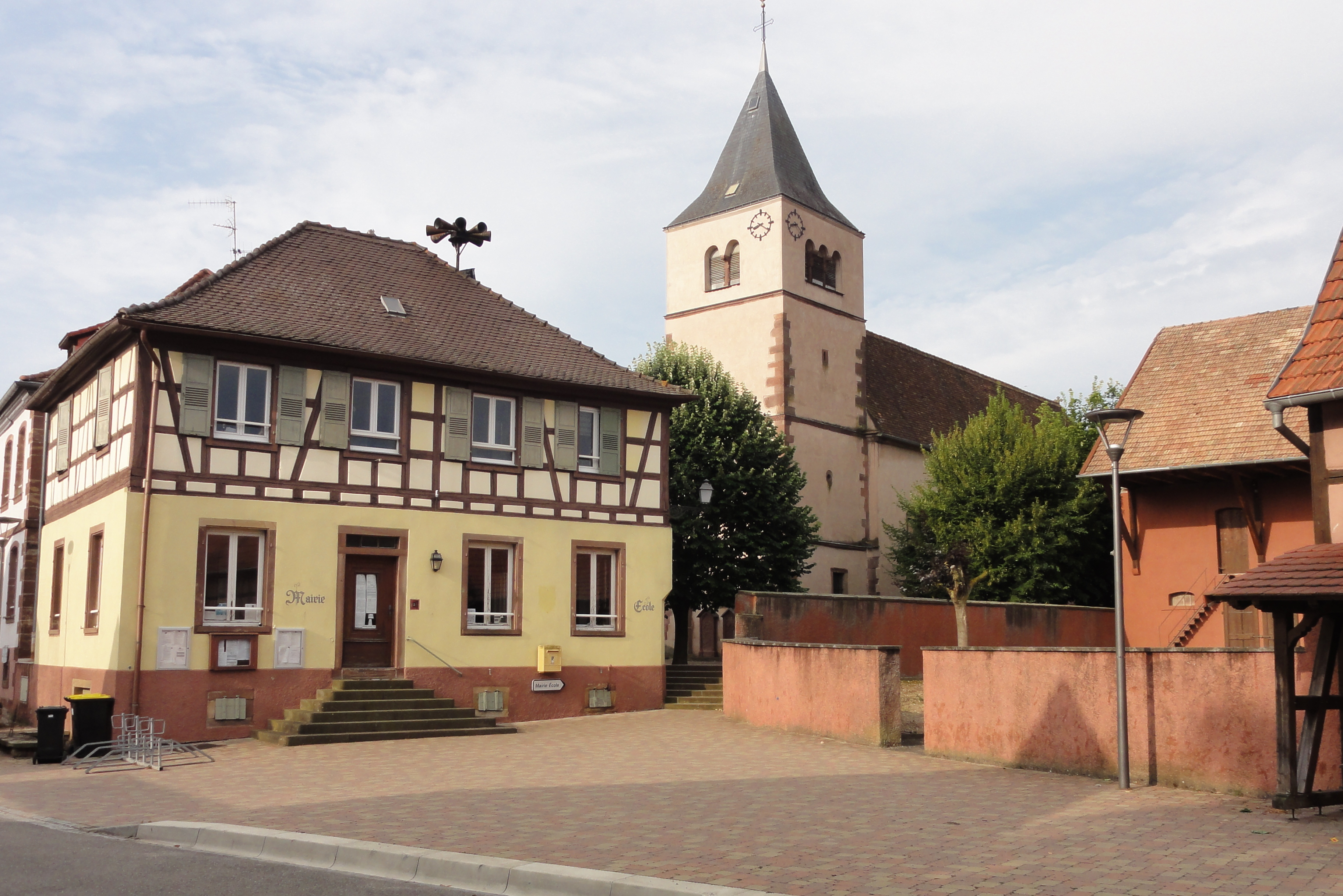 Alsace, Bas-Rhin, Fessenheim-le-Bas, Église St Martin et mairie-école (XIXe), 5 rue de l'église. .